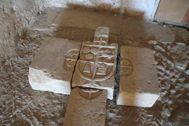 Escudo